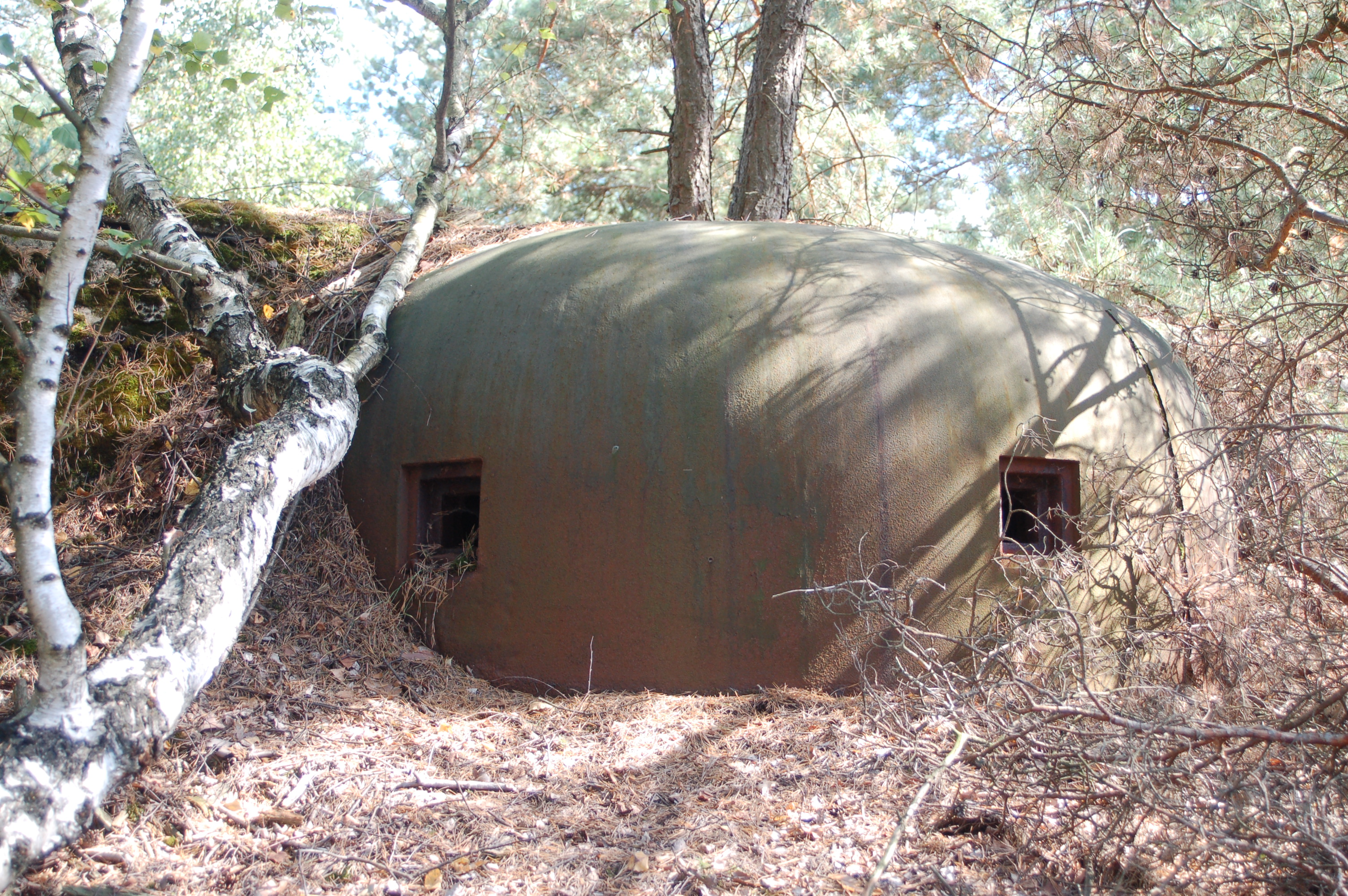 Kopuła bunkra na poligonie Bory Dolnośląskie w rejonie Pstrąża